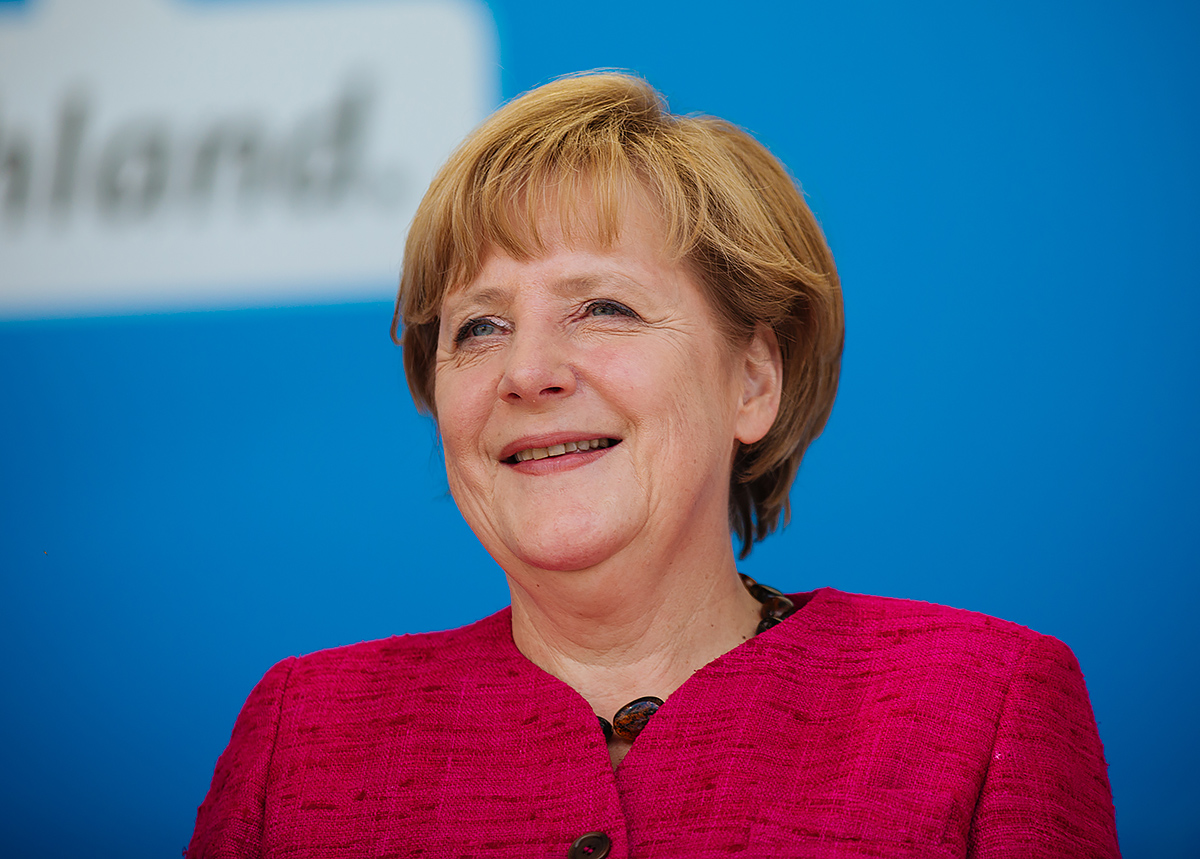 Bundeskanzlerin Dr. Angela Merkel am 14.08.2013 bei einer CDU Wahlkampfveranstaltung im hessischen Seligenstadt.